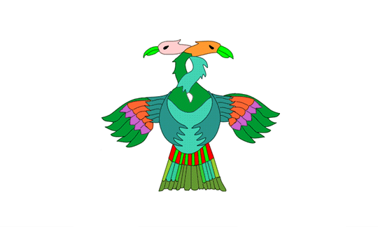 Flag of Baja Verapaz Department, Guatemala